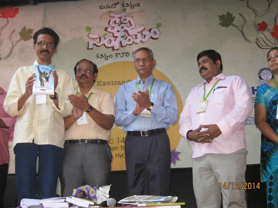 నేను మాత్రం ఇద్దరిని పుస్తకావిష్కరణ సందర్భం